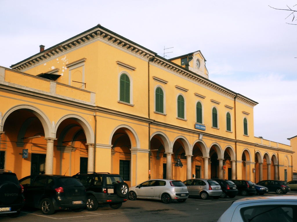 Stazione ferroviaria di Castel San Giovanni.